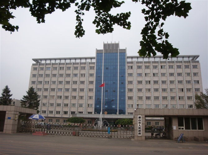 中文（中国大陆）: 位于河北省唐山市